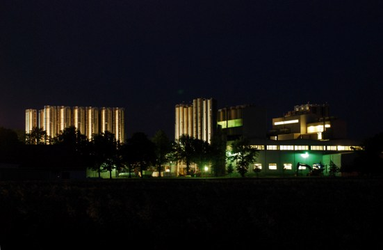 Weißandt-Gölzau, Industriegebiet bei Nacht